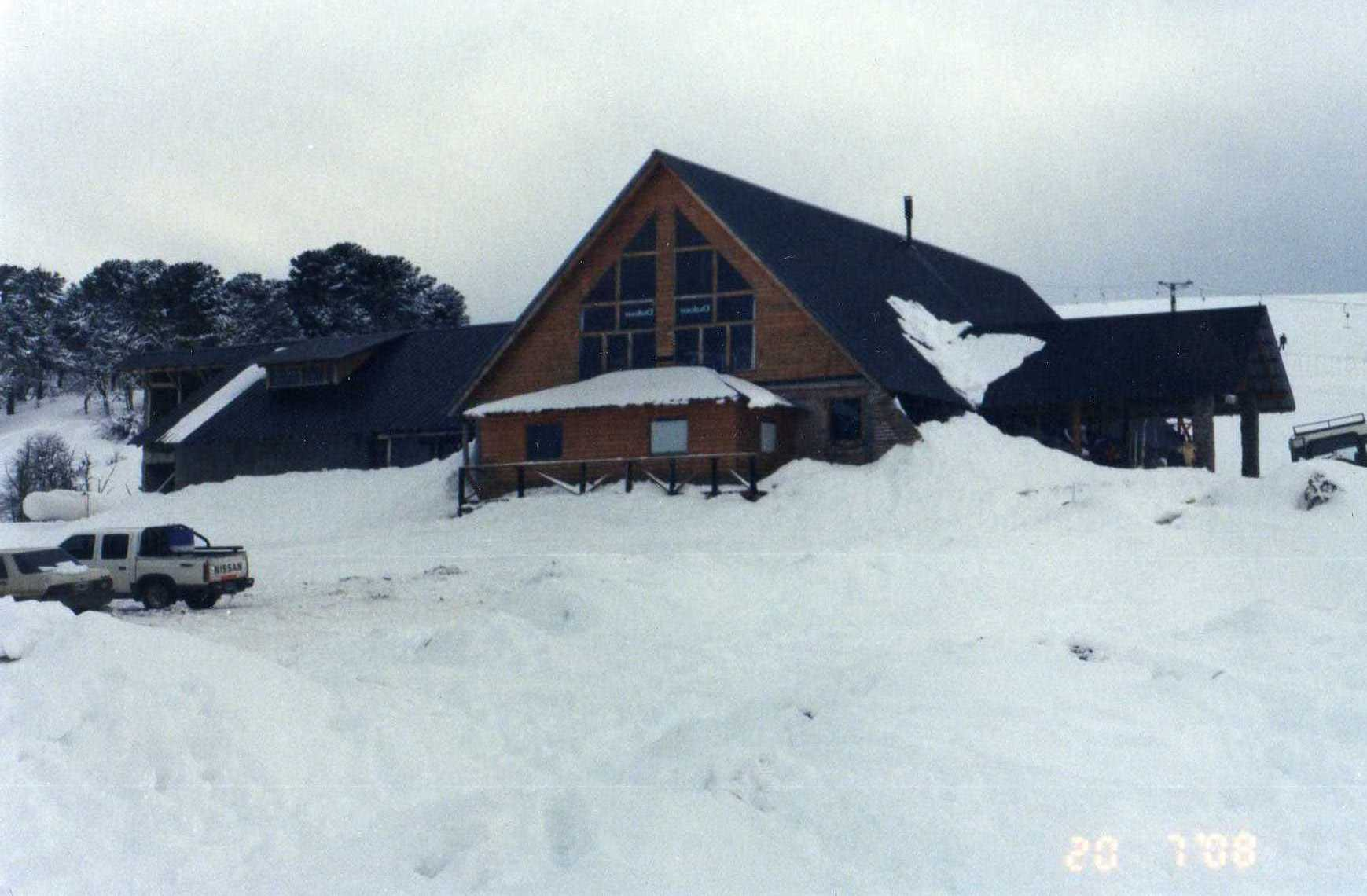 Aqui se ve claramente el centro de descanso y restaurant de el centro de ski Batea Mauida de Villa Pehuenia